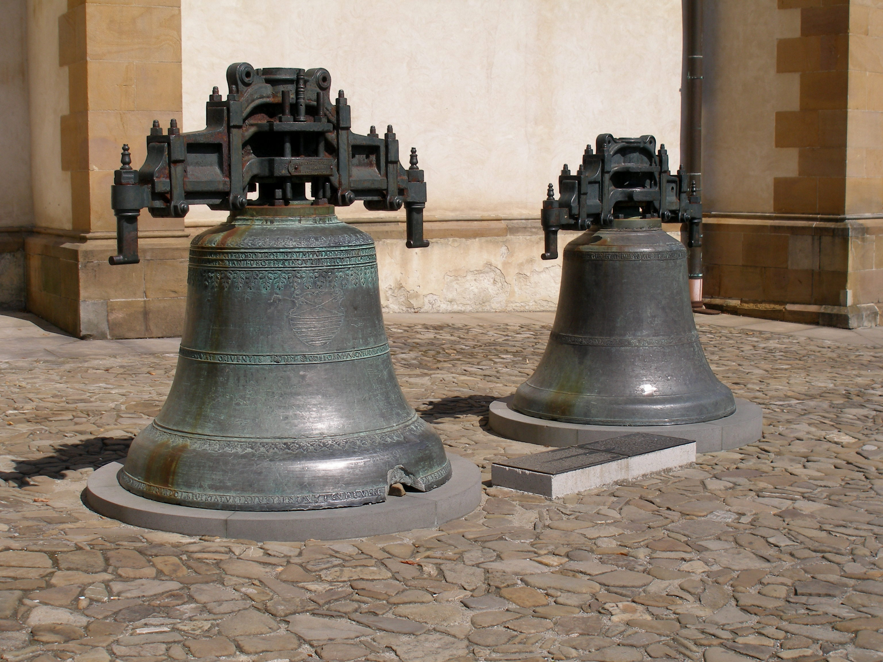 Renesančno-gotické námestie, starobylé námestie obdĺžnikového tvaru má rozlohu 260x80 metrov. V jeho strede sa nachádza architektonický skvost - Mestská radnica. Námestie je obkolesené z troch strán 46-timi poschodovými meštianskymi domami, postavenými na typických úzkych stredovekých parcelách, kolmých na námestie. Do námestia sú orientované všetky významné ulice historického jadra. Dlažbu námestia tvorili pôvodne mačacie hlavy. Môžete ich tu vidieť i dnes. Námestie Bardejova bolo v stredoveku trhovým námestím - konali sa na ňom jarmoky. Najvýznamnejšou pamiatkou námestia je rímskokatolícka Bazilika svätého Egídia, stojacia v jeho severnej časti. Začali ju stavať začiatkom 15. storočia a postupne dostala podobu veľkolepej gotickej baziliky s tromi loďami. V interiéri zaujme súbor 11 neskorogotických oltárov z 15. a 16. storočia, z ktorých niektoré plastiky sa považujú za vrcholné európske rezbárske práce.